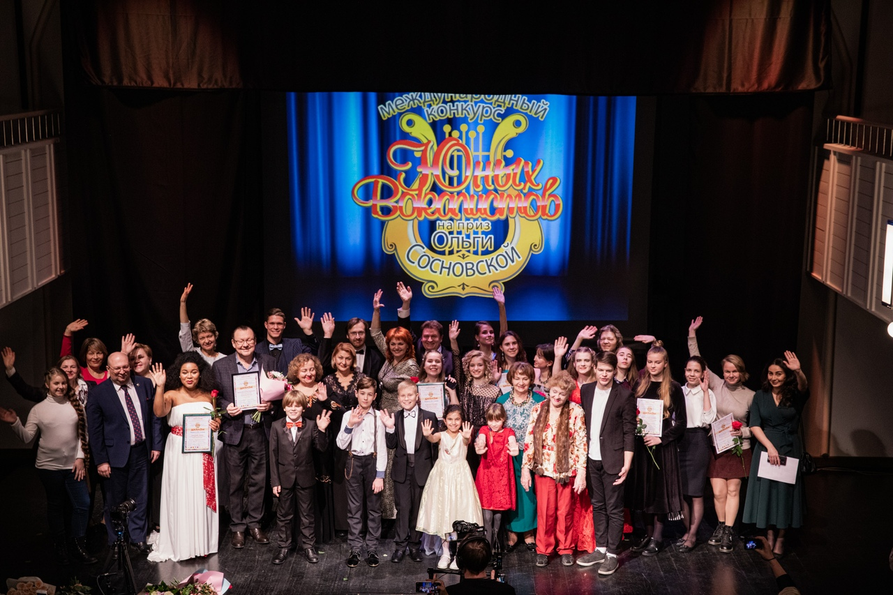 2019 год